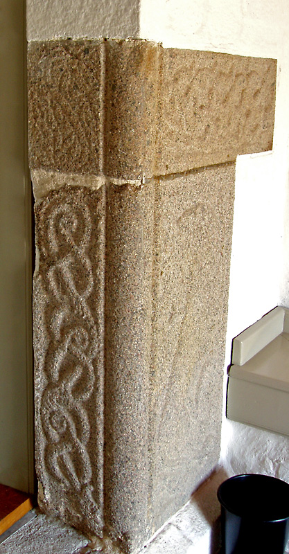 Del af granitportalLyngby Kirke, Århus Kommune, Denmark Image by me Nico-dk/Nils Jepsen